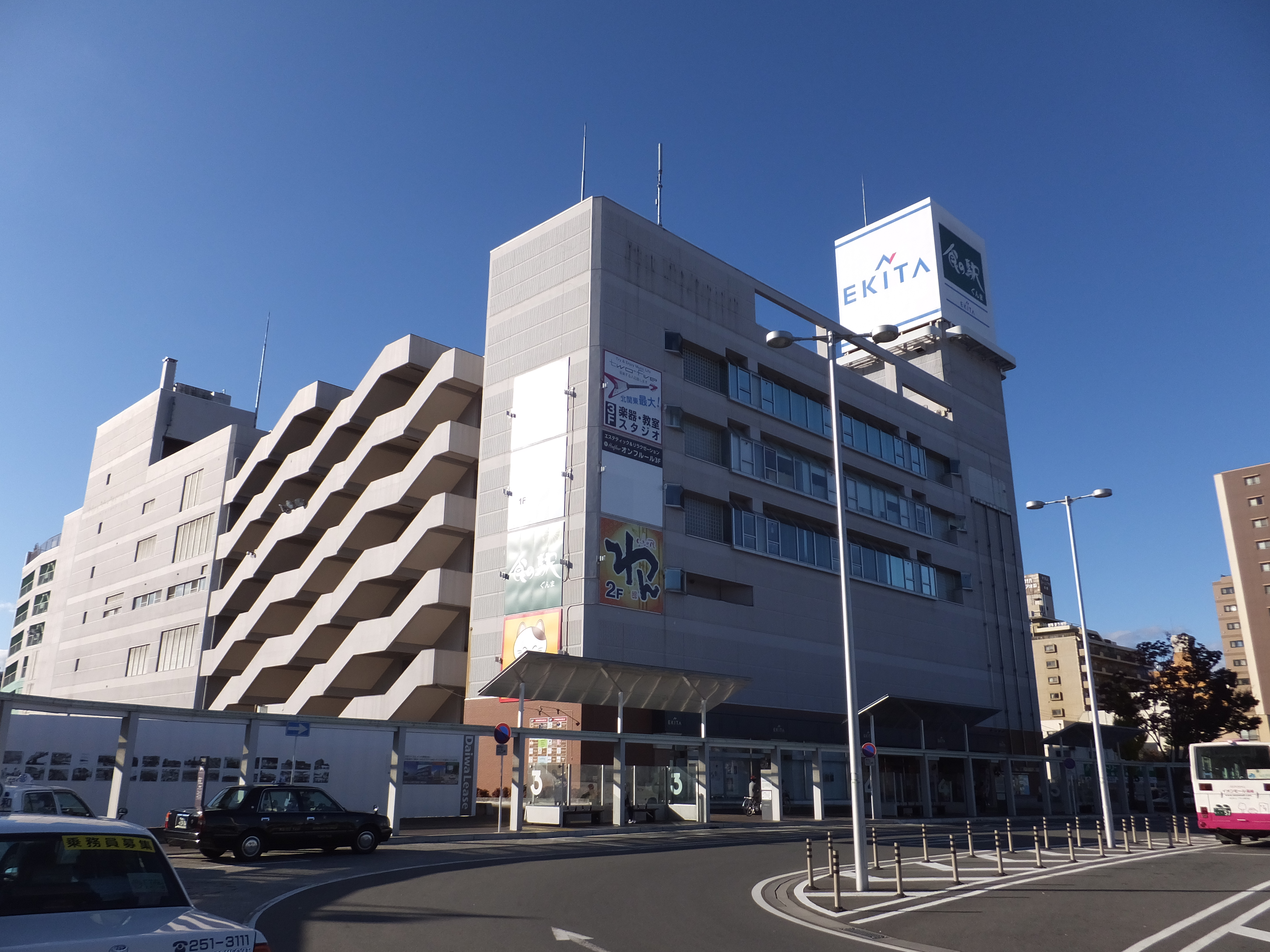 北口ロータリーからエキータを望む。 2015年11月15日撮影